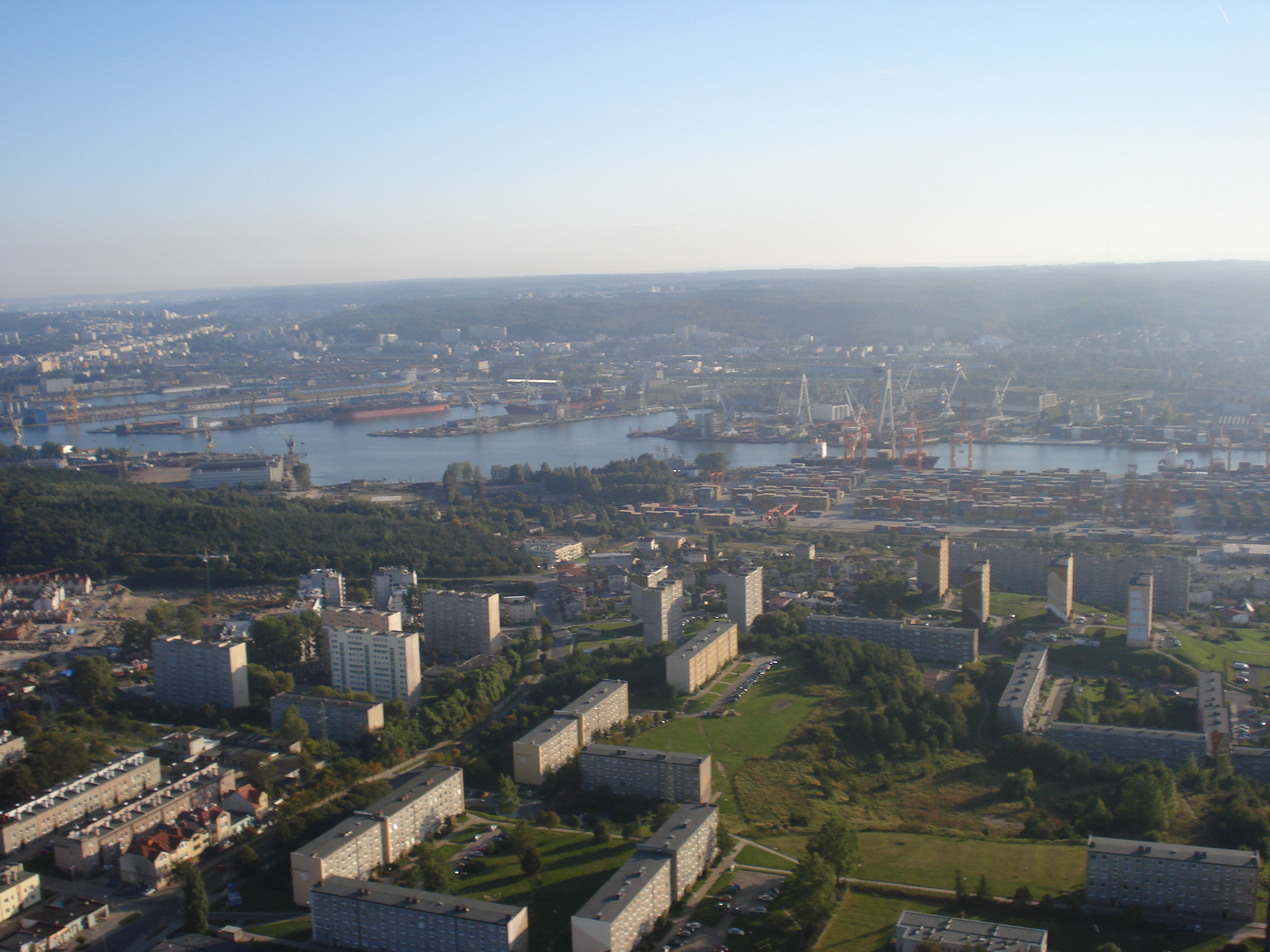 Gdynia z "lotu ptaka"